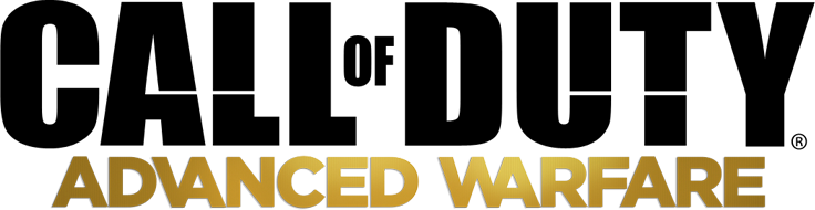 Logo von Call of Duty Advanced Warfare